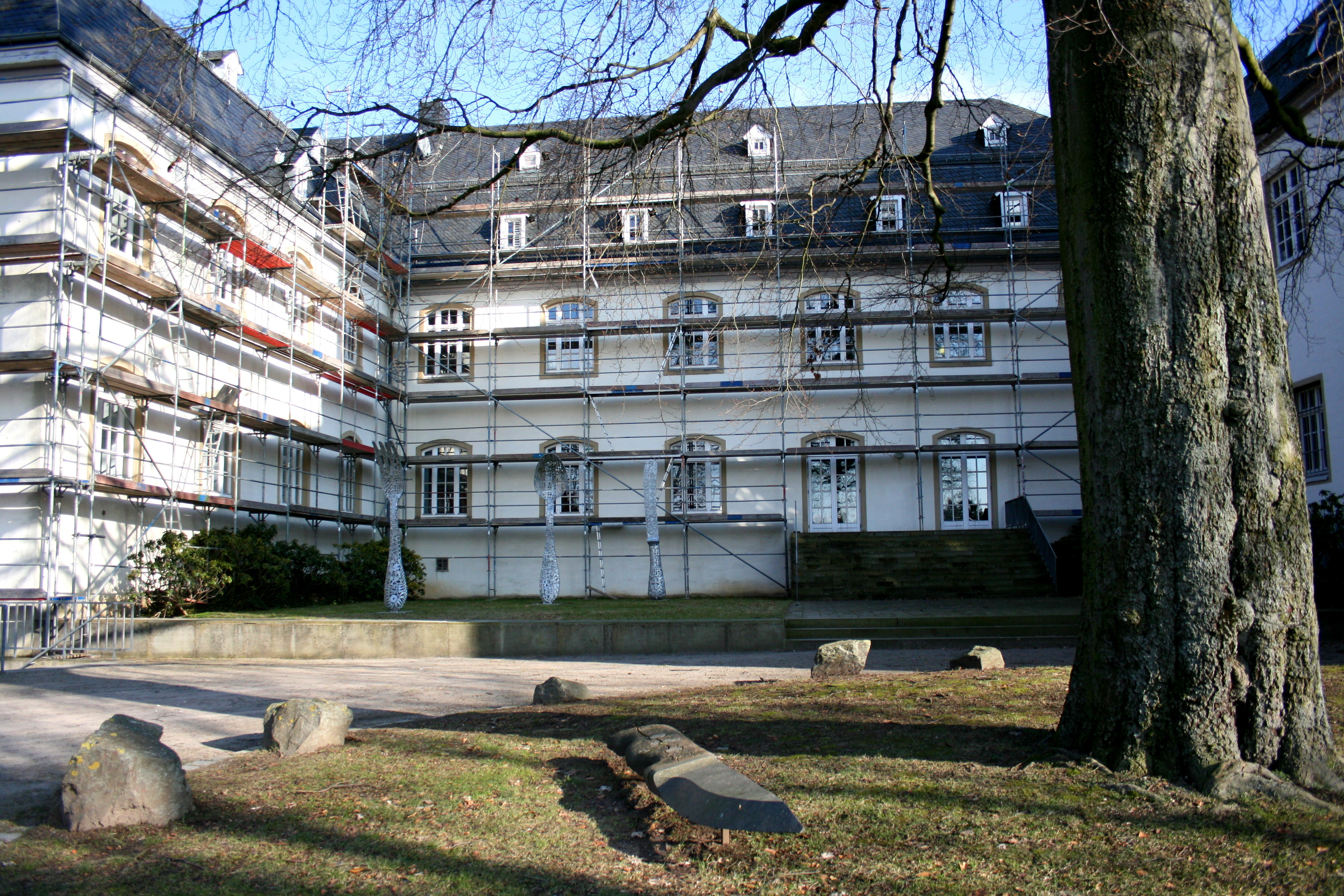 Deutsches Klingenmuseum in Solingen